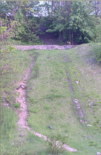 Łódź - Ruda Pabianicka - Rudzka Góra - skocznia narciarska Autor: 2004, Marek Szuszkiewicz